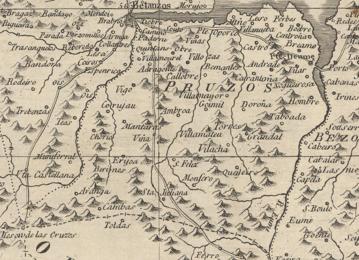 Arciprestado de Pruzos no mapa do arcebispado de Santiago de Compostela realizado por Angel Marin, cura de S. Salvador de Poio.